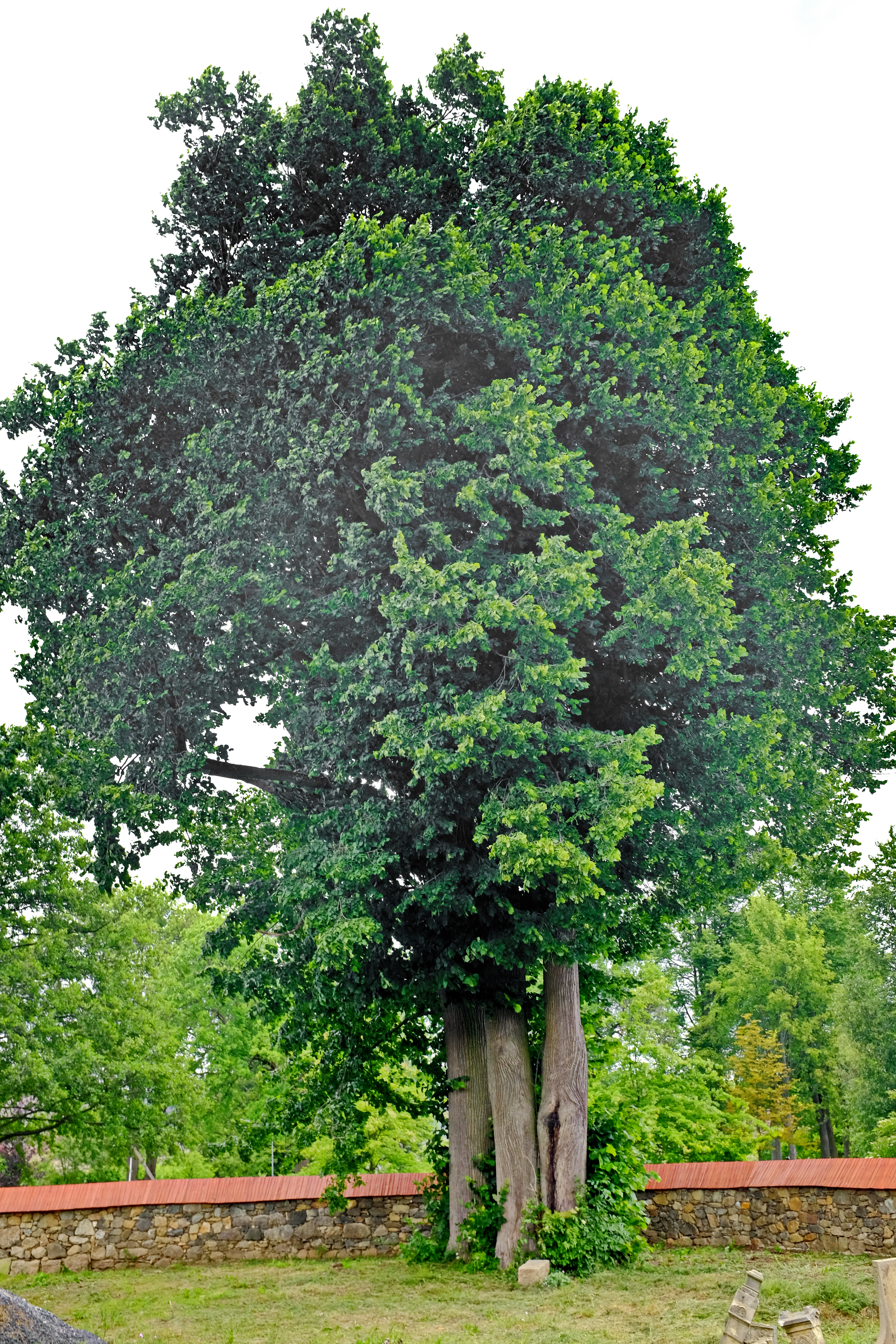 Památné stromy - Lípy u kostela v Přílezech - okres Karlovy Vary